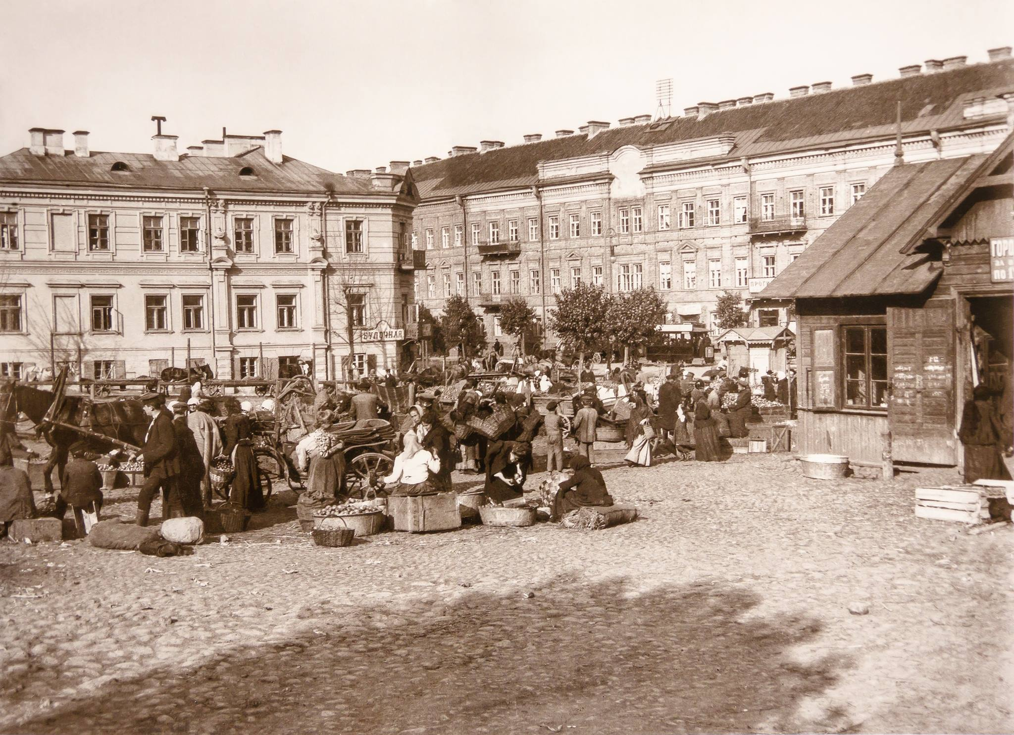 Беларуская (тарашкевіца): Вільня (Vilnia), скрыжаваньне вуліц Завальнай (vulica Zavalnaja) і Наваградзкай (vulica Navahradzkaja)